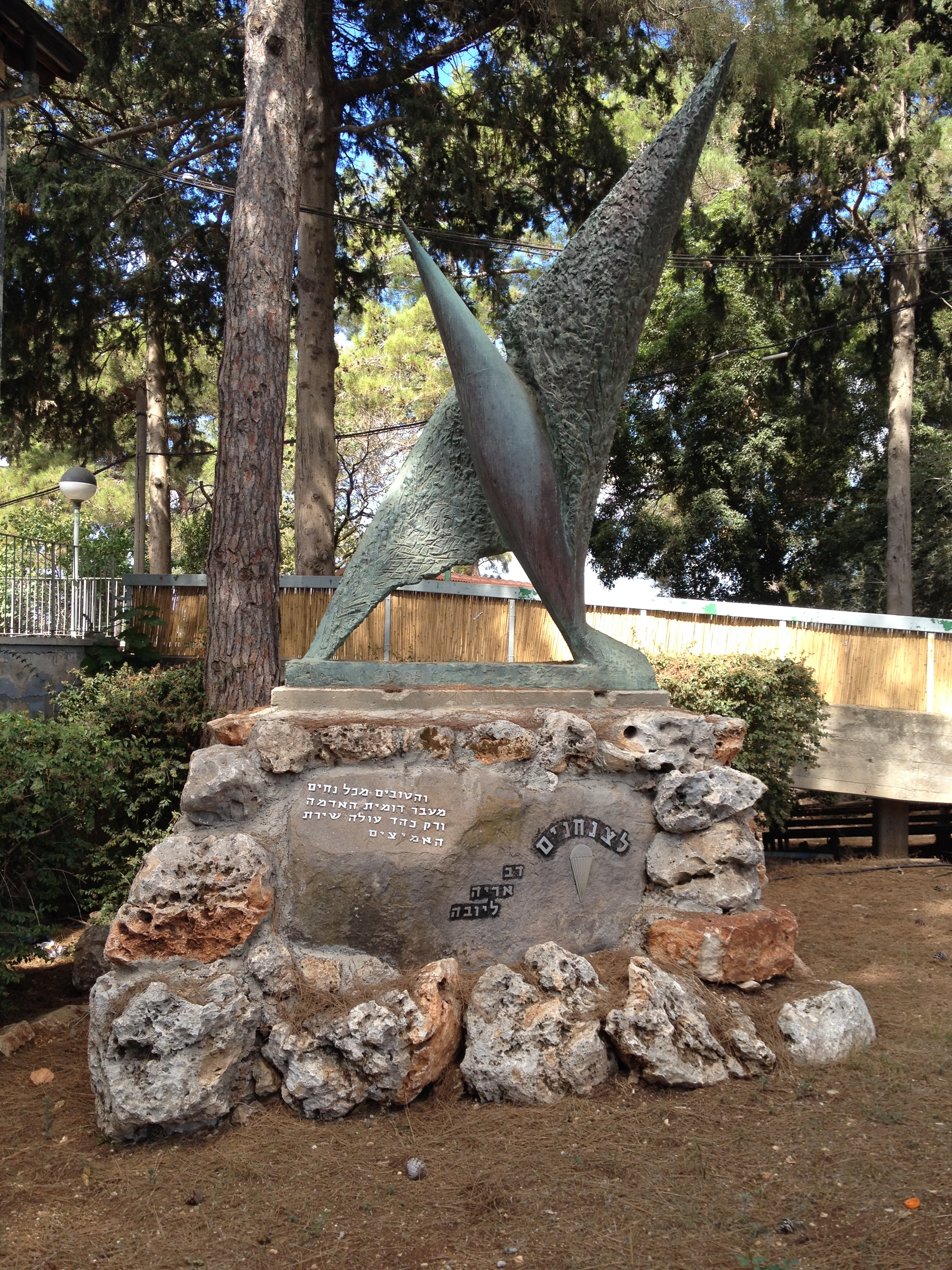 Памятник двум парашютистам - участникам WWII, трагически погибшим в 1954 году.